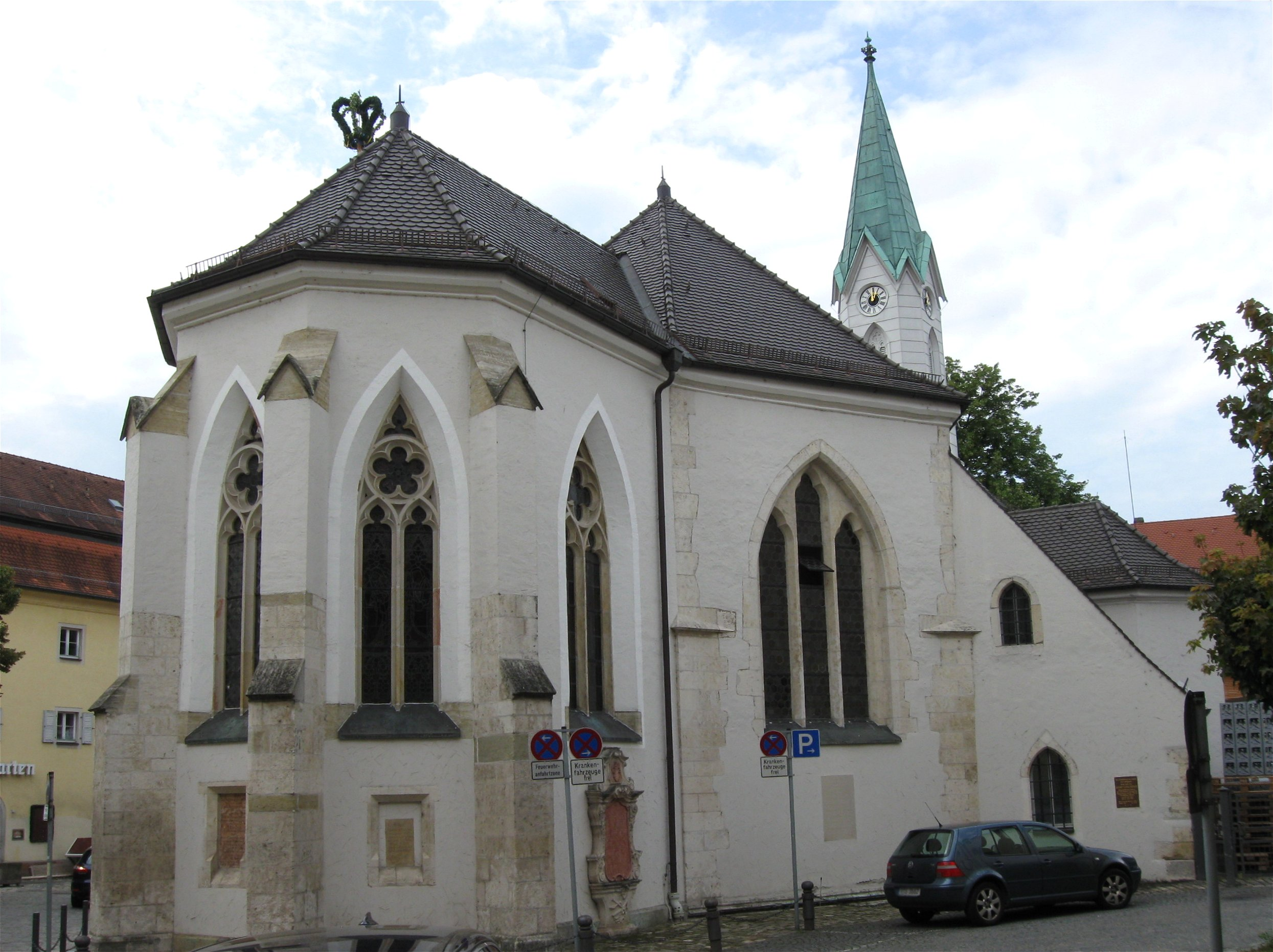 St.-Katharinen-Platz 3; St. Katharinenspital mit kath. Pfarr- und Spitalkirche St. Katharina (bis 1809 Friedhofskapelle St. Michael oder St. Johannes), sechseckiger Zentralbau mit Chor, westlichem Langhaus und Dachreiter, um 1220/30 errichtet als Mausoleum der Familie Zant, Langhaus bez. 1287, 1489 Vergrößerung des Chors, 1858-60 Chorneubau, Regotisierung und durchgreifende Umbauten durch Michael Maurer; mit Ausstattung